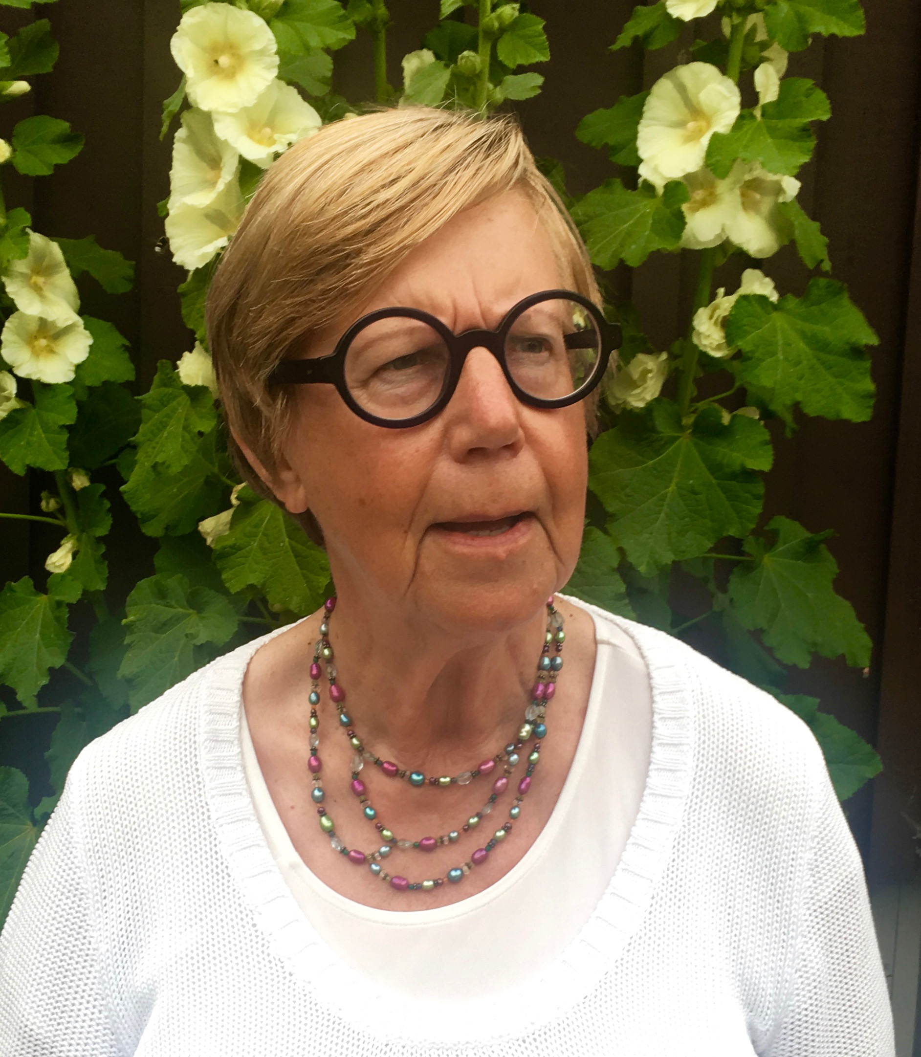 Barbro Hedvall, svensk jounalist, 2019